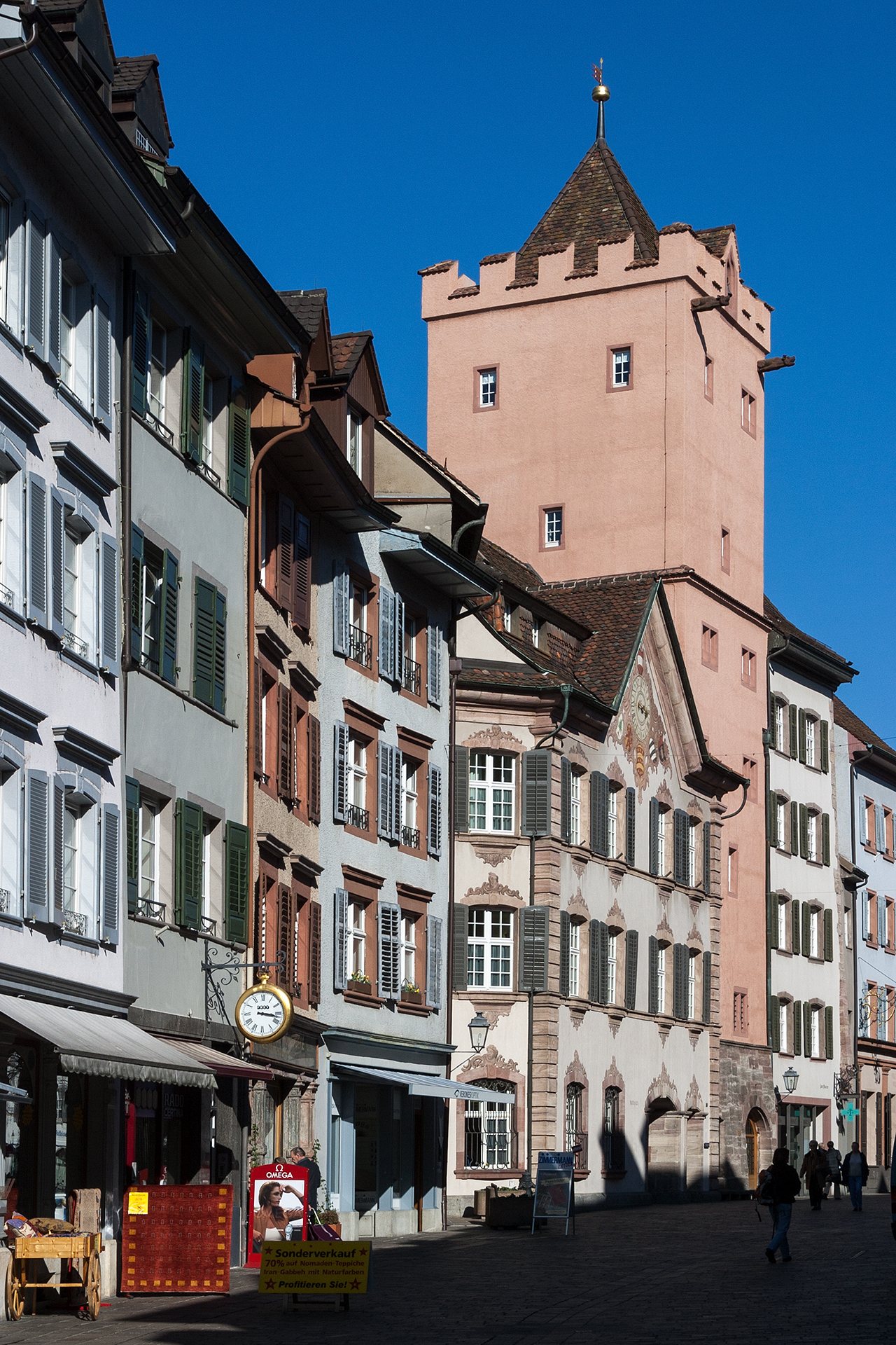 Rathausturm in Rheinfelden (AG)